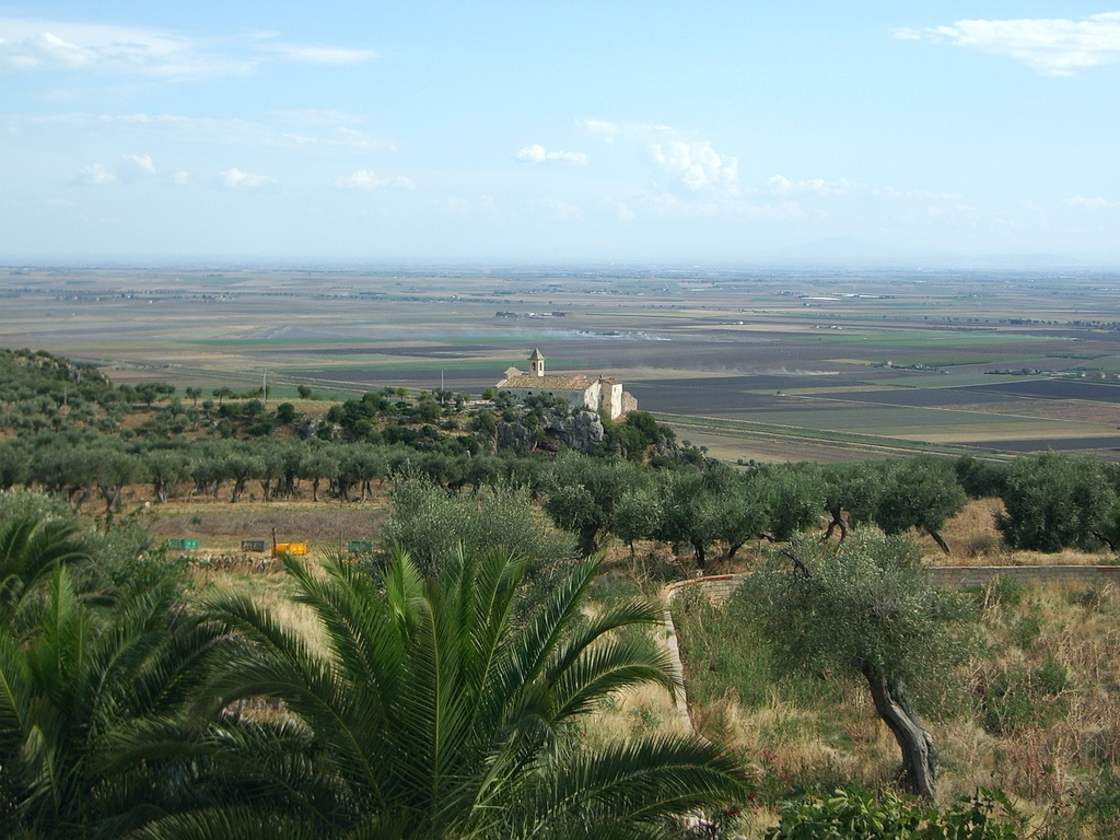 Tavoliere delle Puglie - Italia.